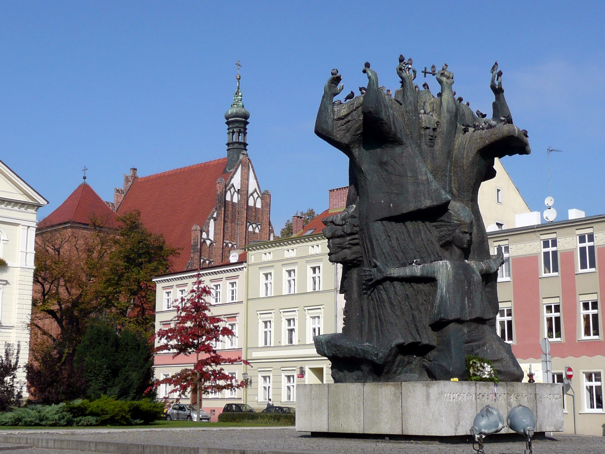 Bydgoszcz, Stary Rynek